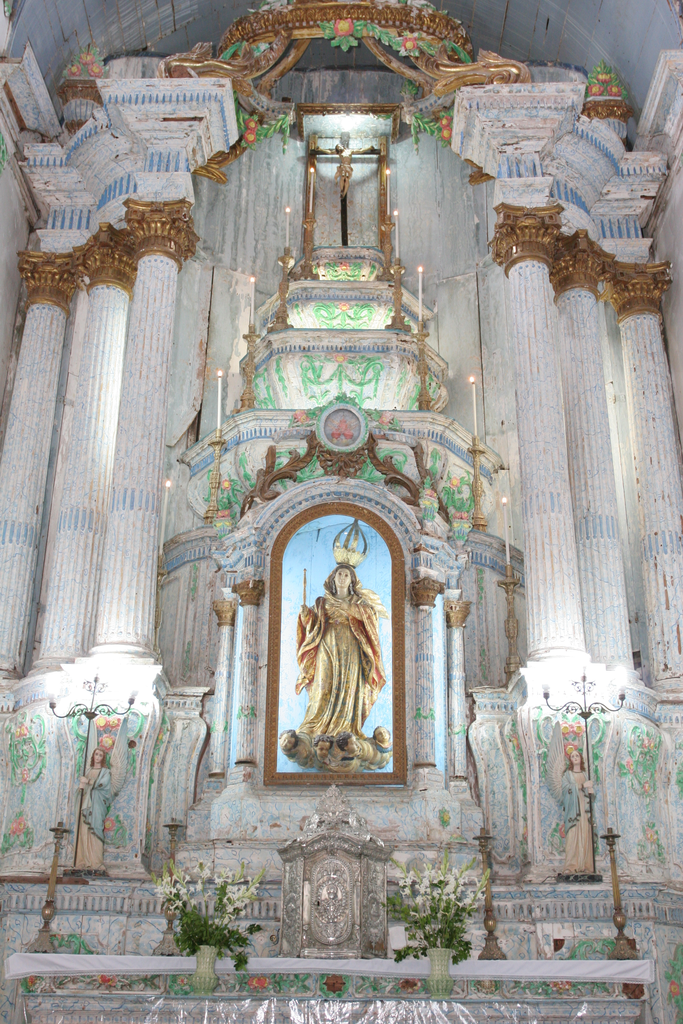 Altar principal da igreja de Nossa Senhora do Amparo localizada atrás da prefeitura municipal de Santo Amaro - Ba